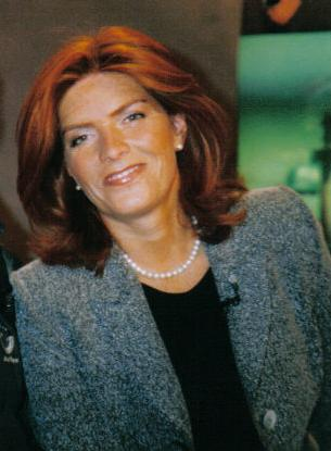 Katarzyna Dowbor - polska prezenterka telewizyjna.